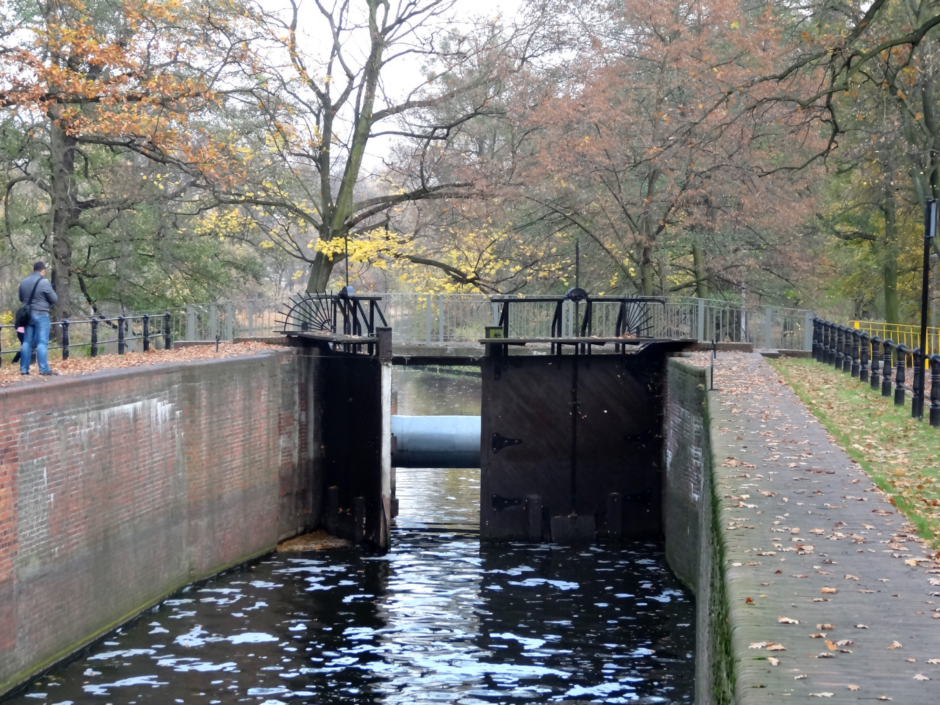 Śluza V przy ul. Czarna Droga w Bydgoszczy na Starym Kanale Bydgoskim